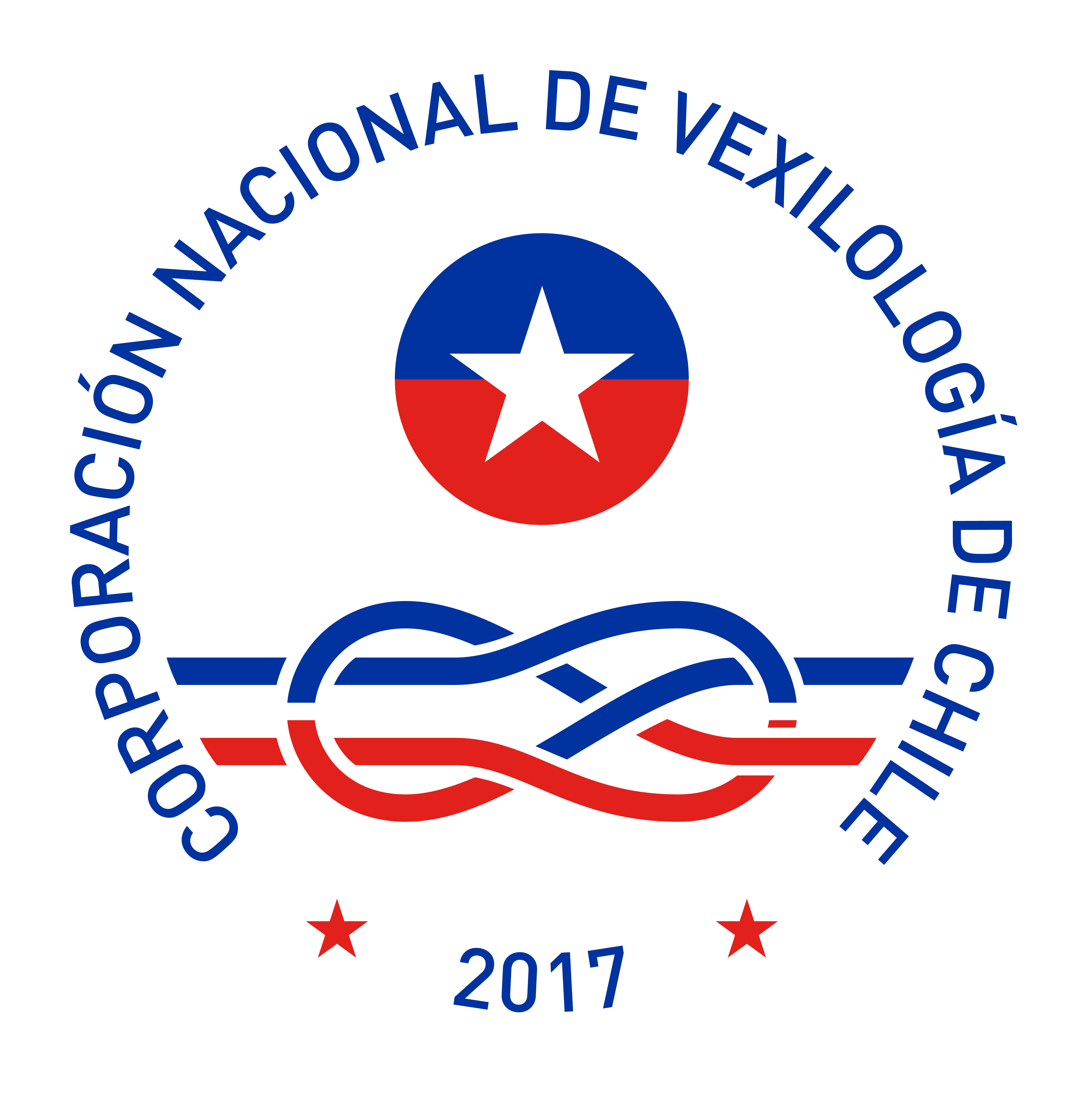 El emblema une una versión simplificada del Escudo de Armas de la República de Chile junto al símbolo del nudo plano el cual se reconoce como el emblema internacional de la Vexilología, el símbolo se encuentra rodeado por la leyenda "Corporación Nacional de Vexilología de Chile", dos estrellas en rojo y en la parte inferior el año de la fundación de la CONAVEX (2017). Los colores son: -Rojo (Pantone PMS 485C) -Azul (Pantone PMS 286C)